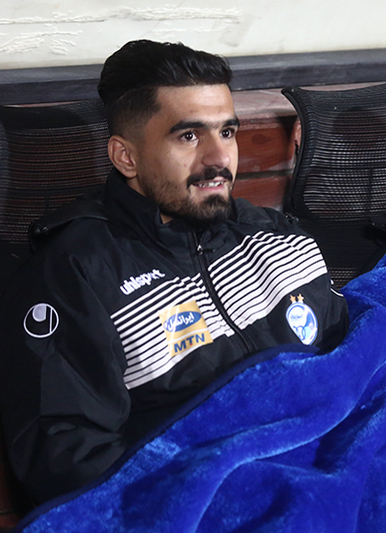 دیدار تیم های استقلال تهران و ماشین سازی تبریز در هفته شانزدهم لیگ برتر فوتبال باشگاه های کشور با برتری ۲ بر یک به سود ماشین سازی در ورزشگاه آزادی تهران به پایان رسید. (مشاهده گزارش بازی)